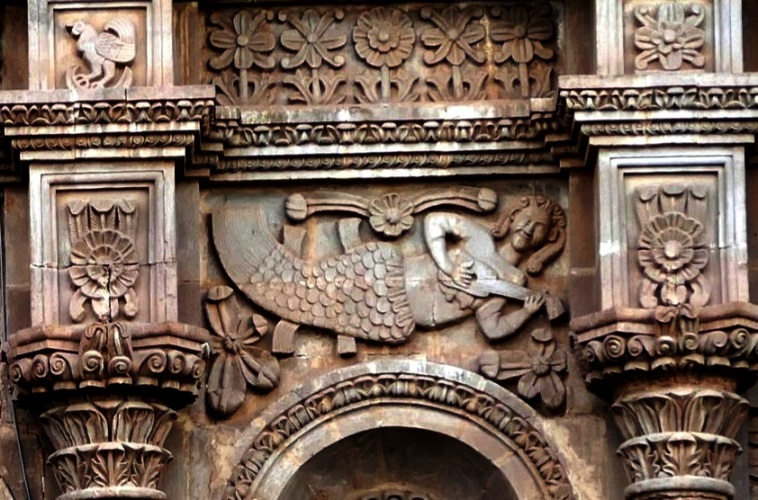 Sirena popular de los indígenas tocando el charango peruano.